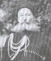 Николай Ильич Устимович ([1866—1918) — российский, а позже украинский военный деятель, подполковник российской императорской армии, генерал-хорунжий Украинской державы.]